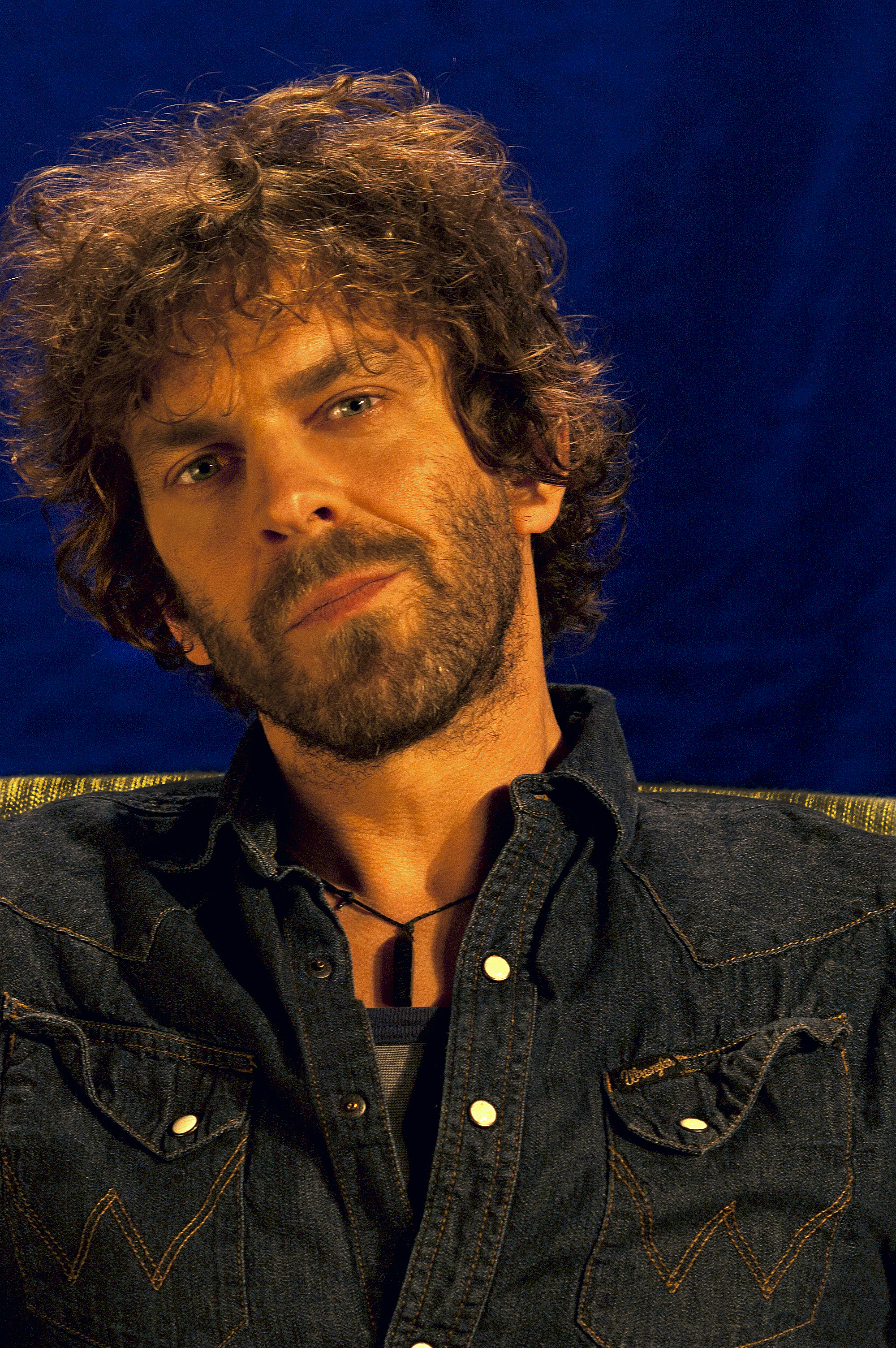 Mattias Hellberg, sångare i Nationalteatern.